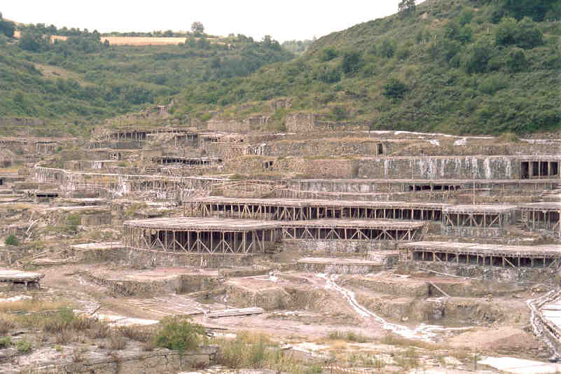 Salinas de Añana en la provincia de Álava (España). Tomada por --JMSE el 4 de julio de 2003 y cedida a Wikipedia. Valle del Río Muera.